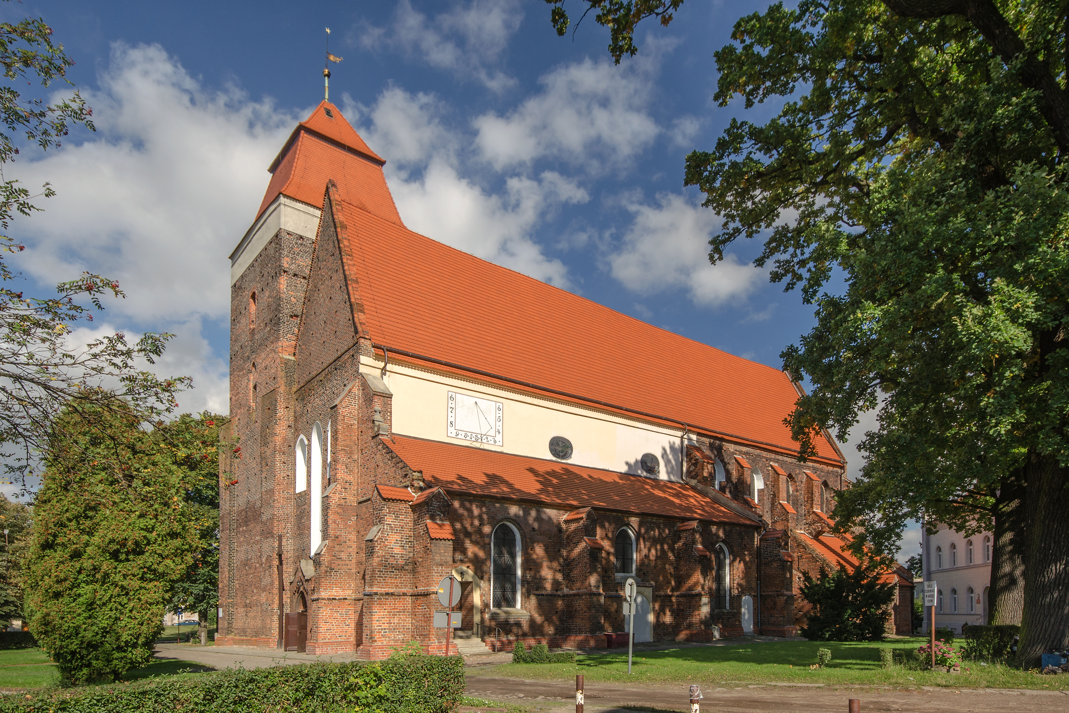 Bierutów, kościół ewangelicki, ob. rzym.-kat. fil. p.w. św. Katarzyny, ok. 1300, XVI, XX